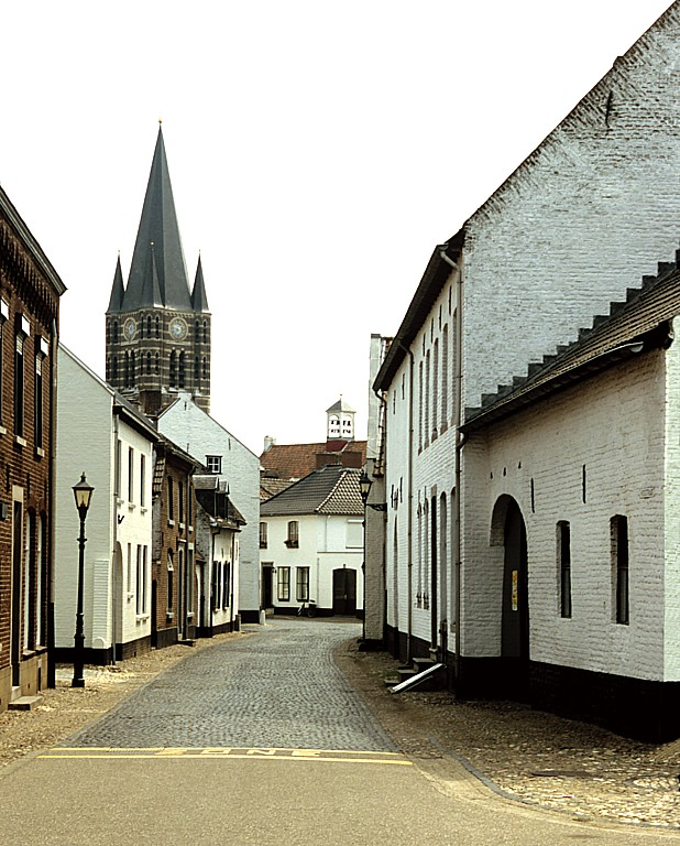 Stein